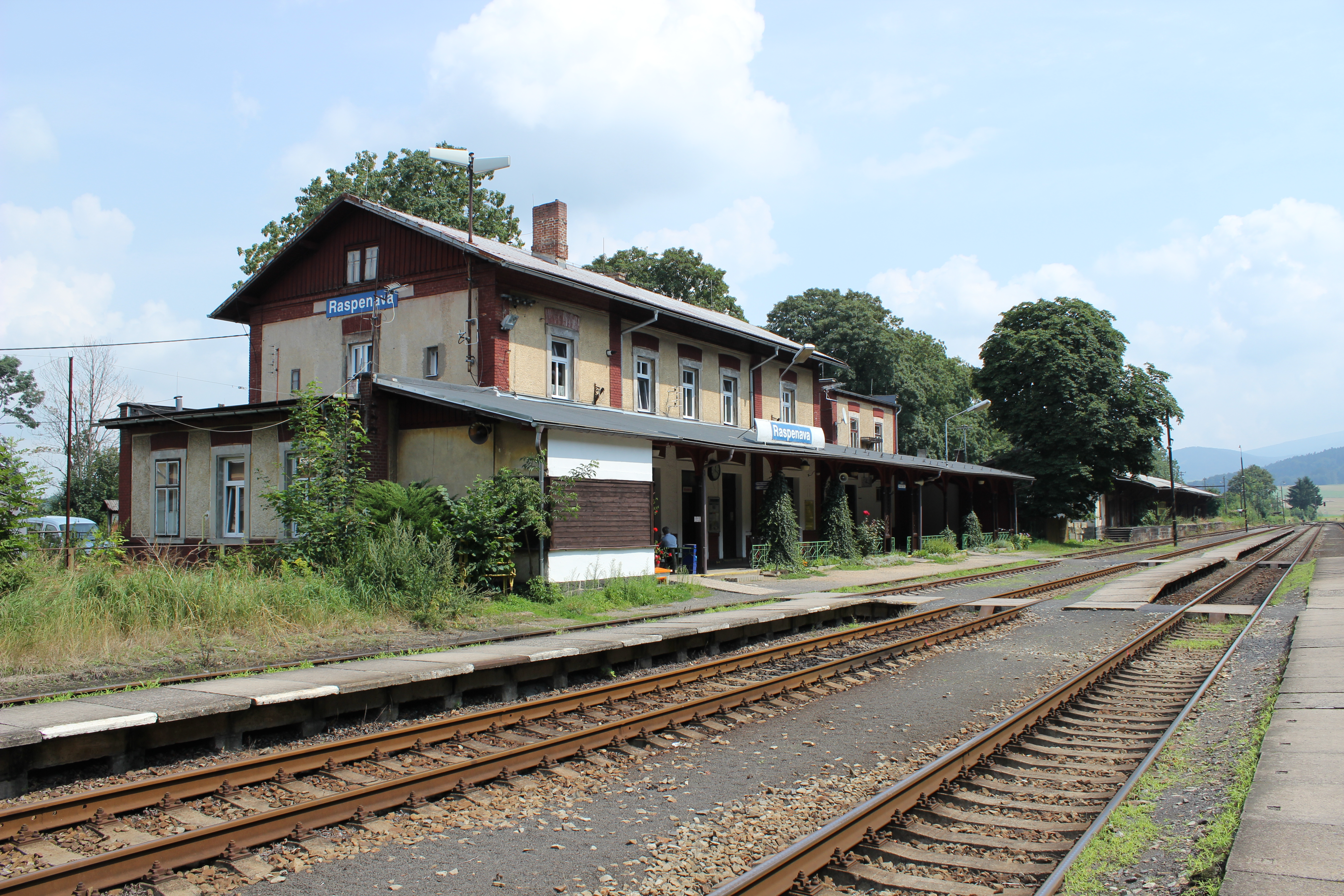 Objekt železniční stanice v Raspenavě.